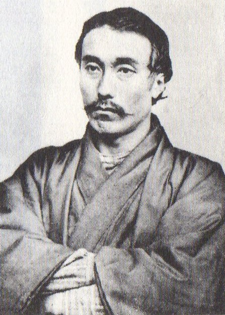 坂本龍馬の甥で高知県議会議員、後の日本基督教会牧師